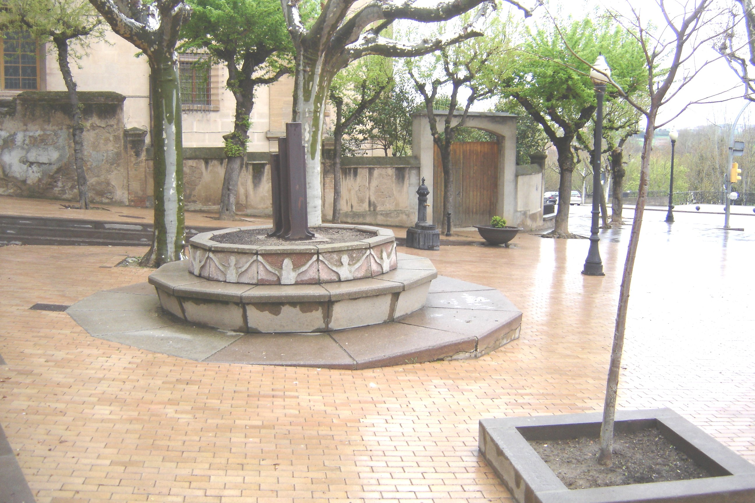 La font del passeig del Vall Calent, a Solsona (Solsonès). En primer terme, el monument a la sardana. Darrera la font, la porta d'entrada a l'hort del Bisbe